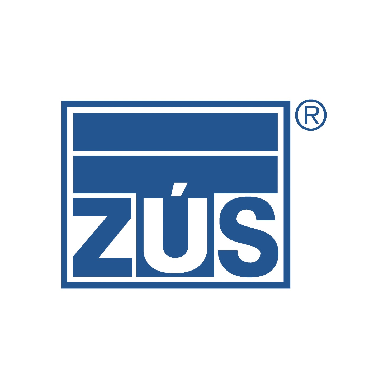 Technický a zkušební ústav stavební Praha, s.p., logo